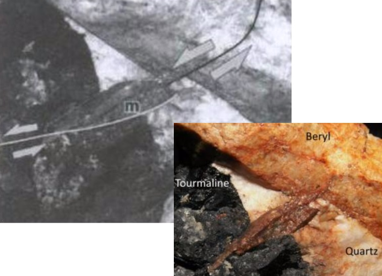 Na snímku v pravém dolním rohu je fotografie monazitu z píseckého pegmatitu U Nového rybníka. Monazit narůstá na tektonickou prasklinu v berylu. Stáří monazitu bylo určeno na přibližně 330 milionů let. Beryl obsahuje hypotetické kavitační lamely a jeho stáří tak může být značně odlišné, například až archaické, od stáří monazitu, který může představovat mladou hydrotermální fázi v rámci vývoje celého pegmatitového tělesa. V levém horním rohu je snímek tektonického nákresu. Beryl obsahuje hypotetické kavitační lamely.